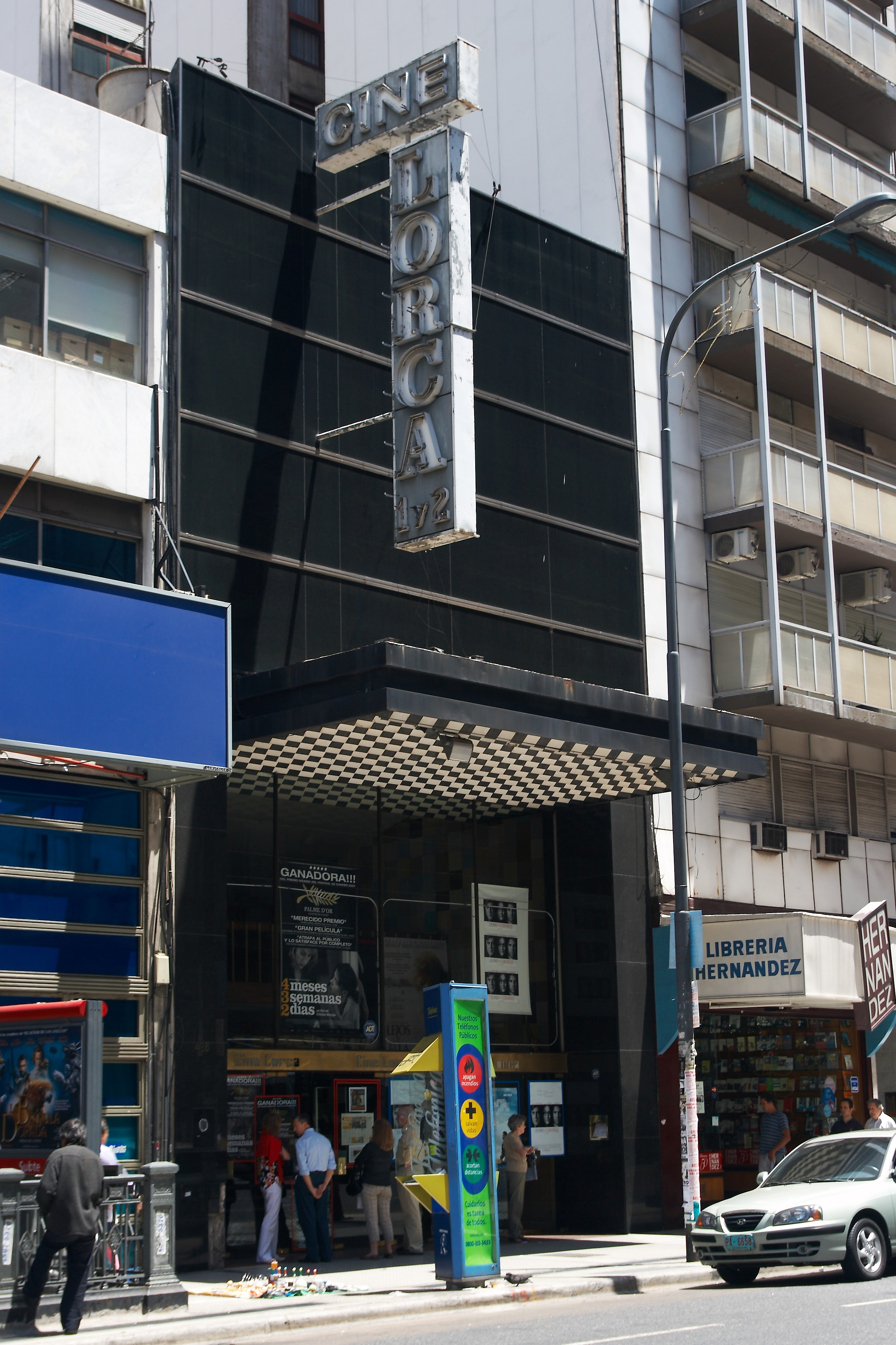 Cine Lorca, Avenida Corriente entre Uruguay y Paraná, barrio de San Nicolás, Buenos Aires, Argentina.